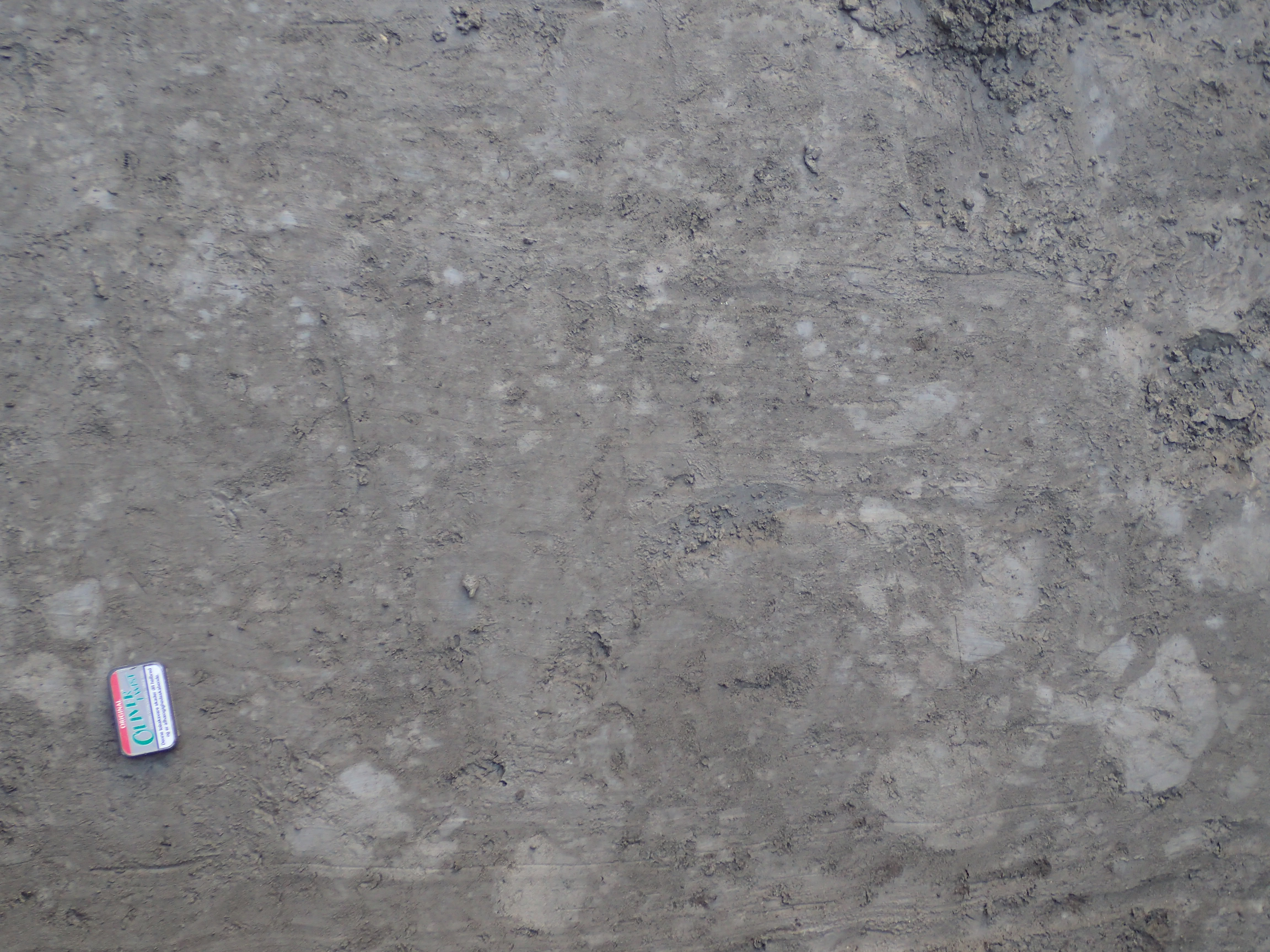 Vandret snit gennem glacialt forstyrret Selandien grønsand, Krauseparken i København; æsken måler 5 cm.